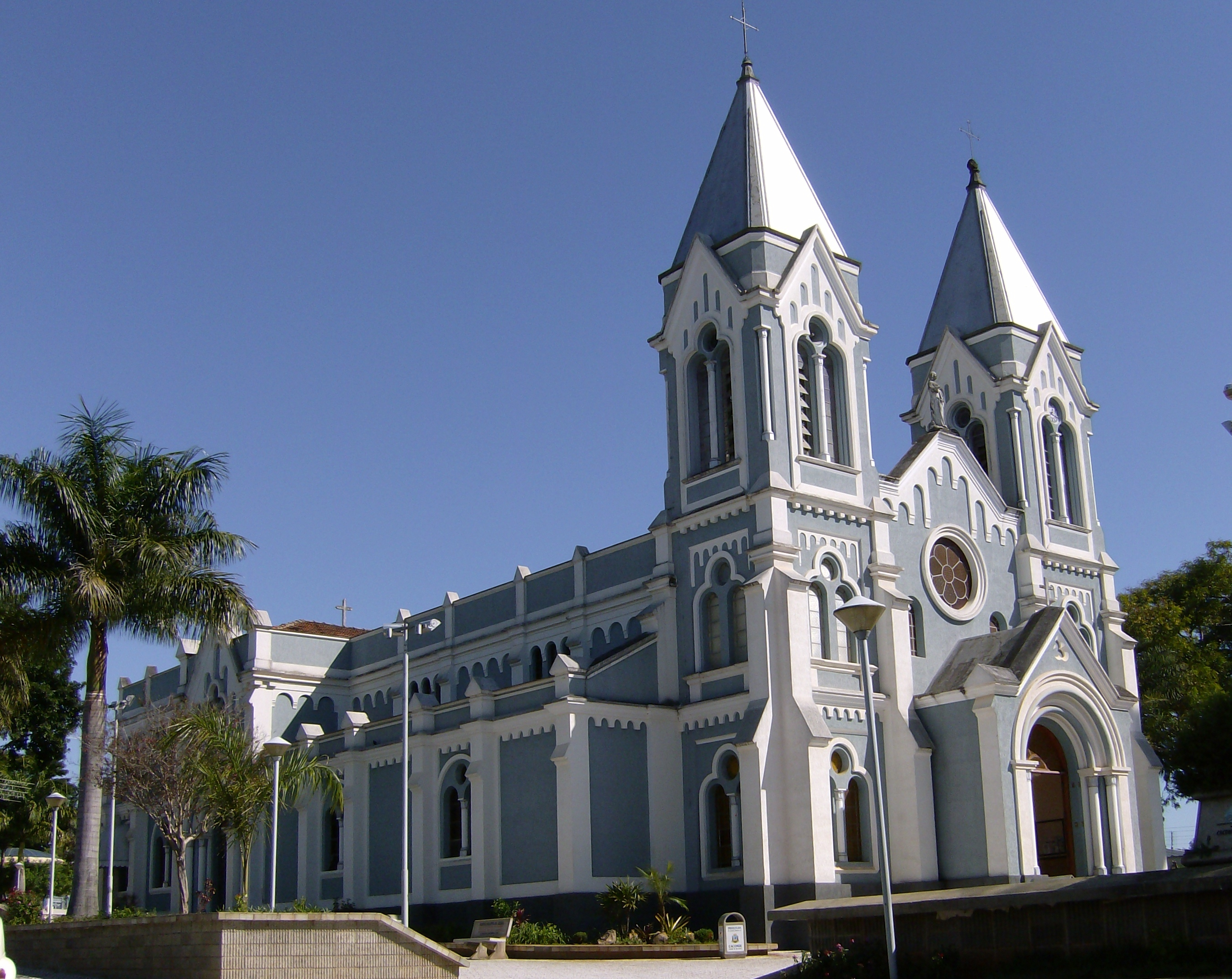 Basílica Santuário de Nossa Senhora da Conceição em Caconde.